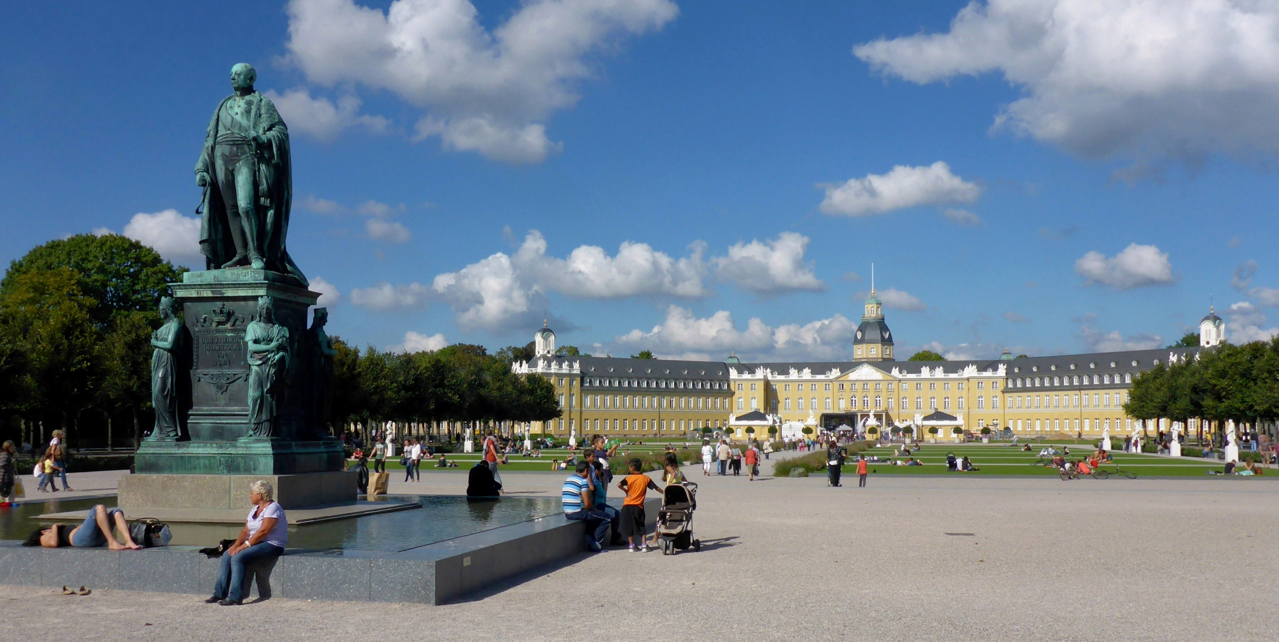 Das Karl-Friedrich-Denkmal am Schlossplatz in Karlsruhe